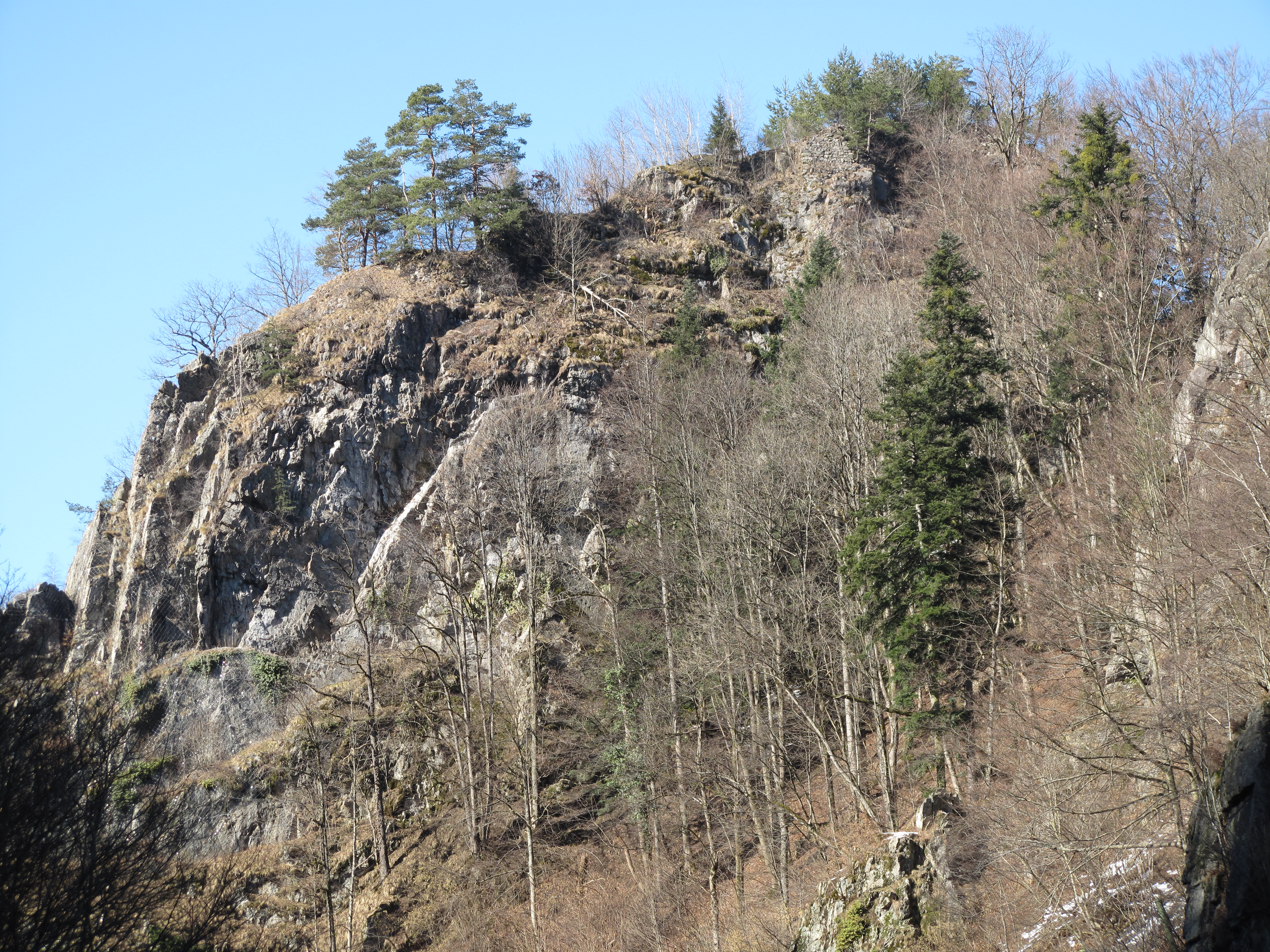 Der Burgfelsen aus Richtung Hirschsprung.